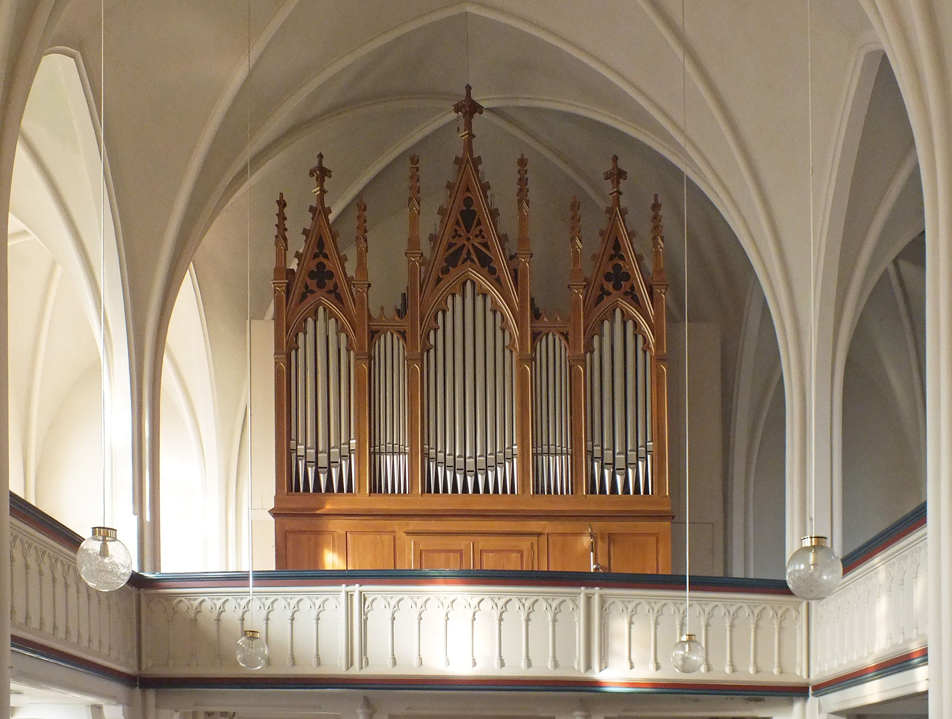 Kreutzbach-Orgel mit neogotischem Prospekt in der Kirche Portitz